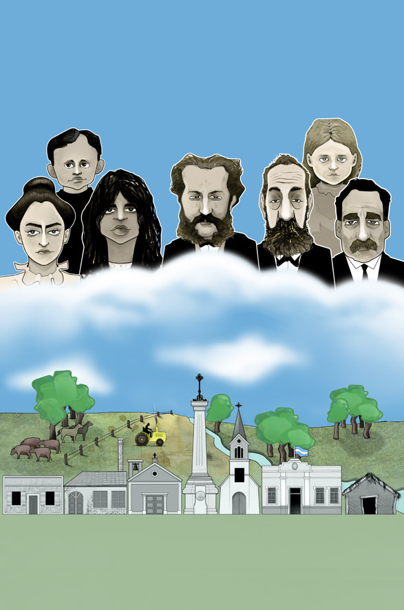 Dibujo representativo de la historia progresina, con su gente, el lugar que eligió para vivir y su obra (dibujo de Hernán Torres, 2002)